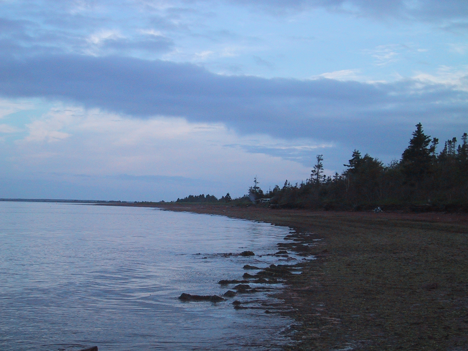 Jacque Cartier Provincial Park, PEI, Canada